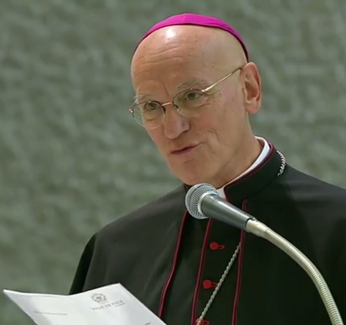 Mgr André Marceau introduisant l'audience donnée par le pape François pour le diocèse de Nice suite à l'attentat perpétré à Nice le 14 juillet 2016.